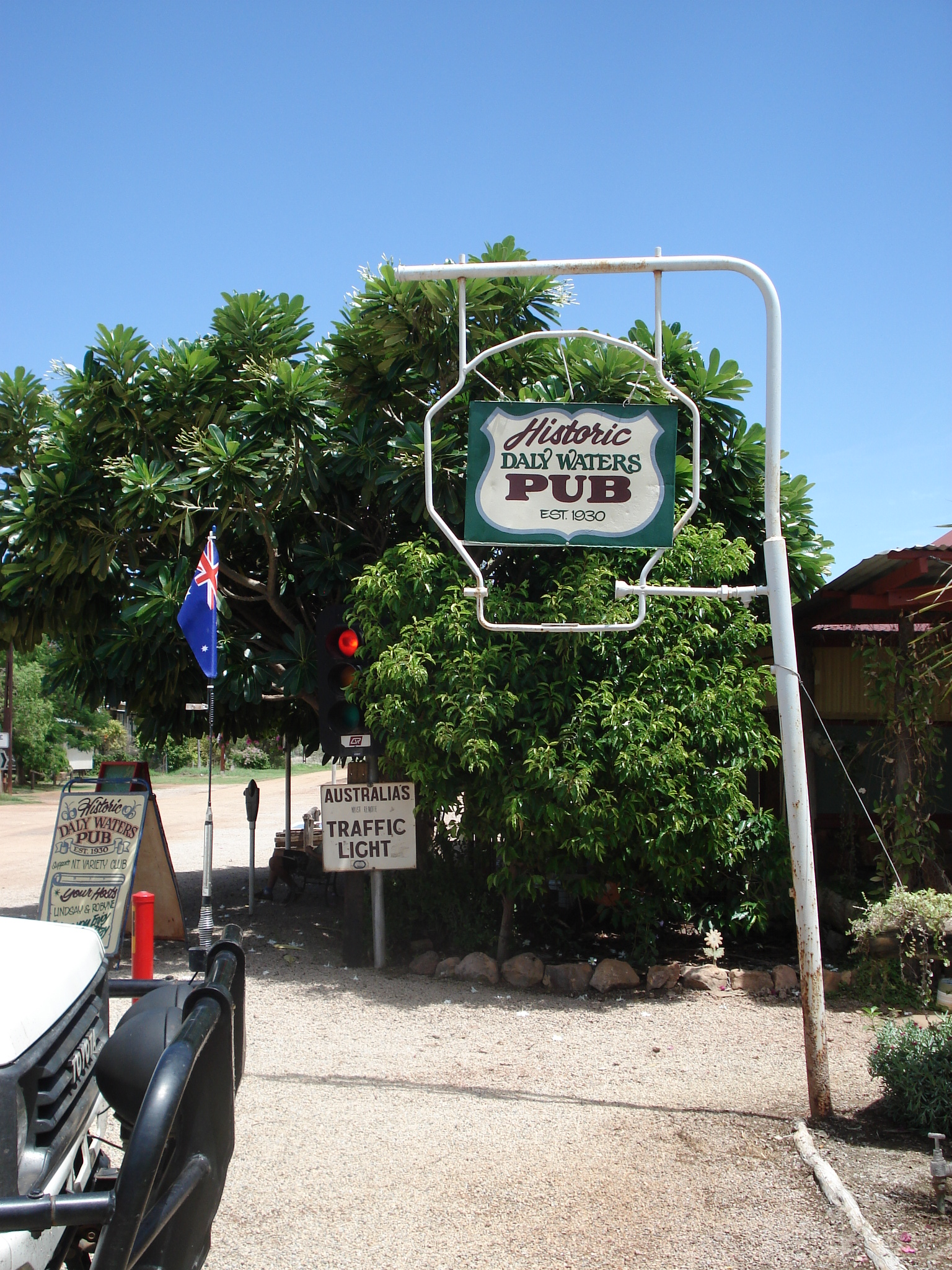 Daily Waters Pup 1